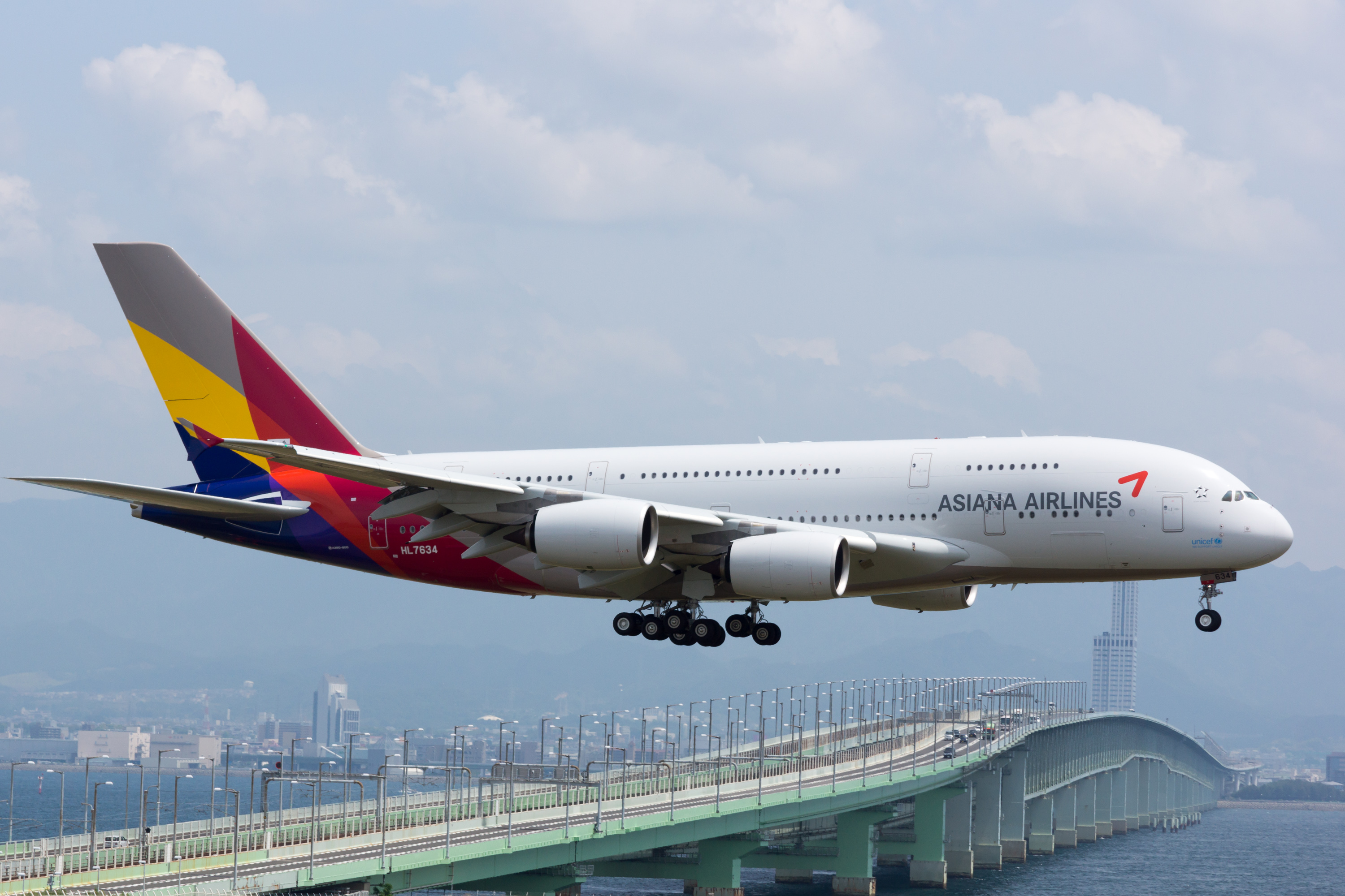 Asiana Airlines/ 아시아나항공/ アシアナ航空 Airbus A380-841 HL7634 OZ112,Arrived from Seoul Osaka Kansai Int'l Airport